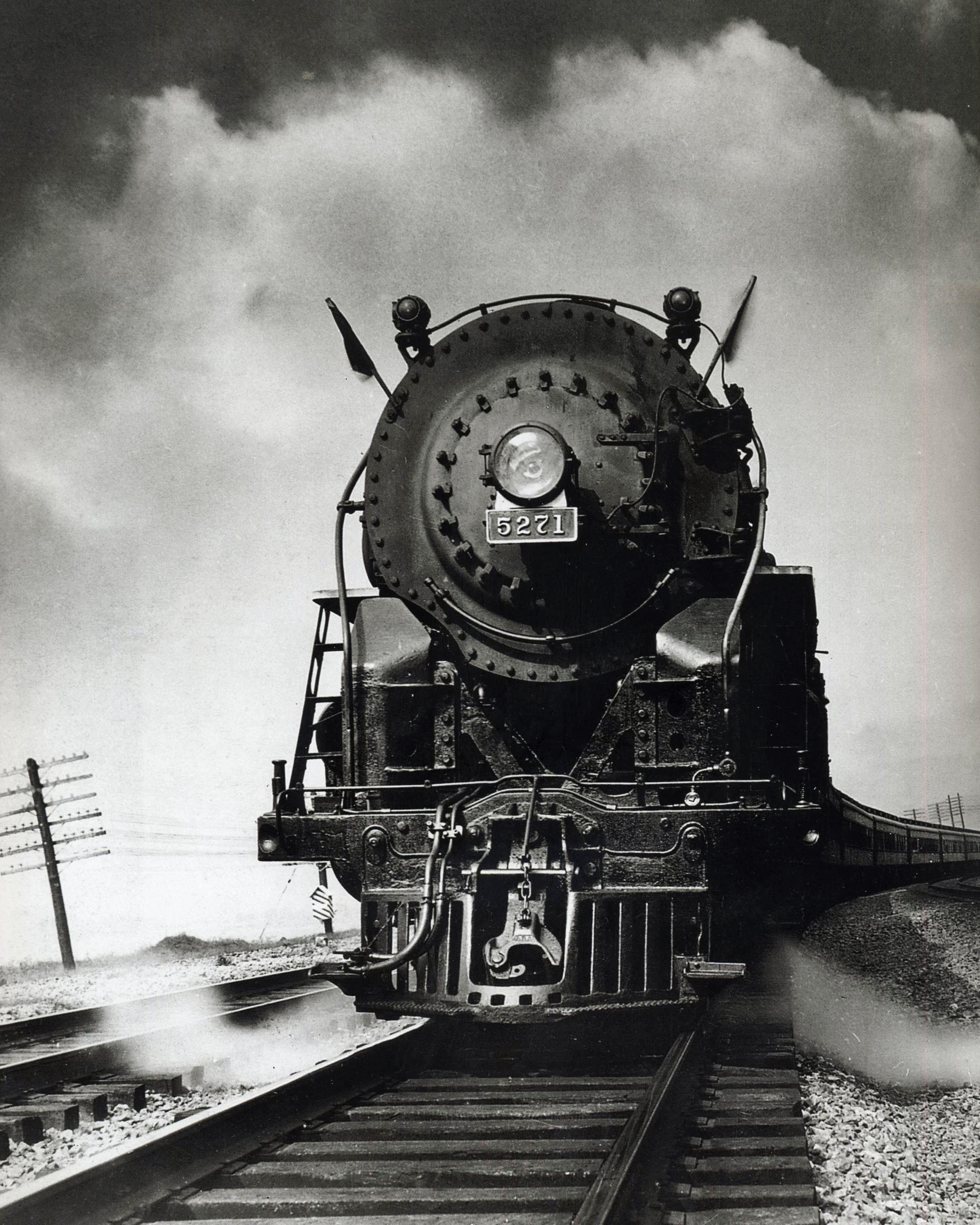 Lokomotiv vum Century. Category:Lokomotiven